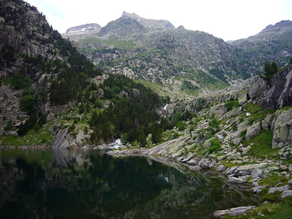 Cascada de Riumalo; la Vall de Boí, Alta Ribagorça, Catalunya